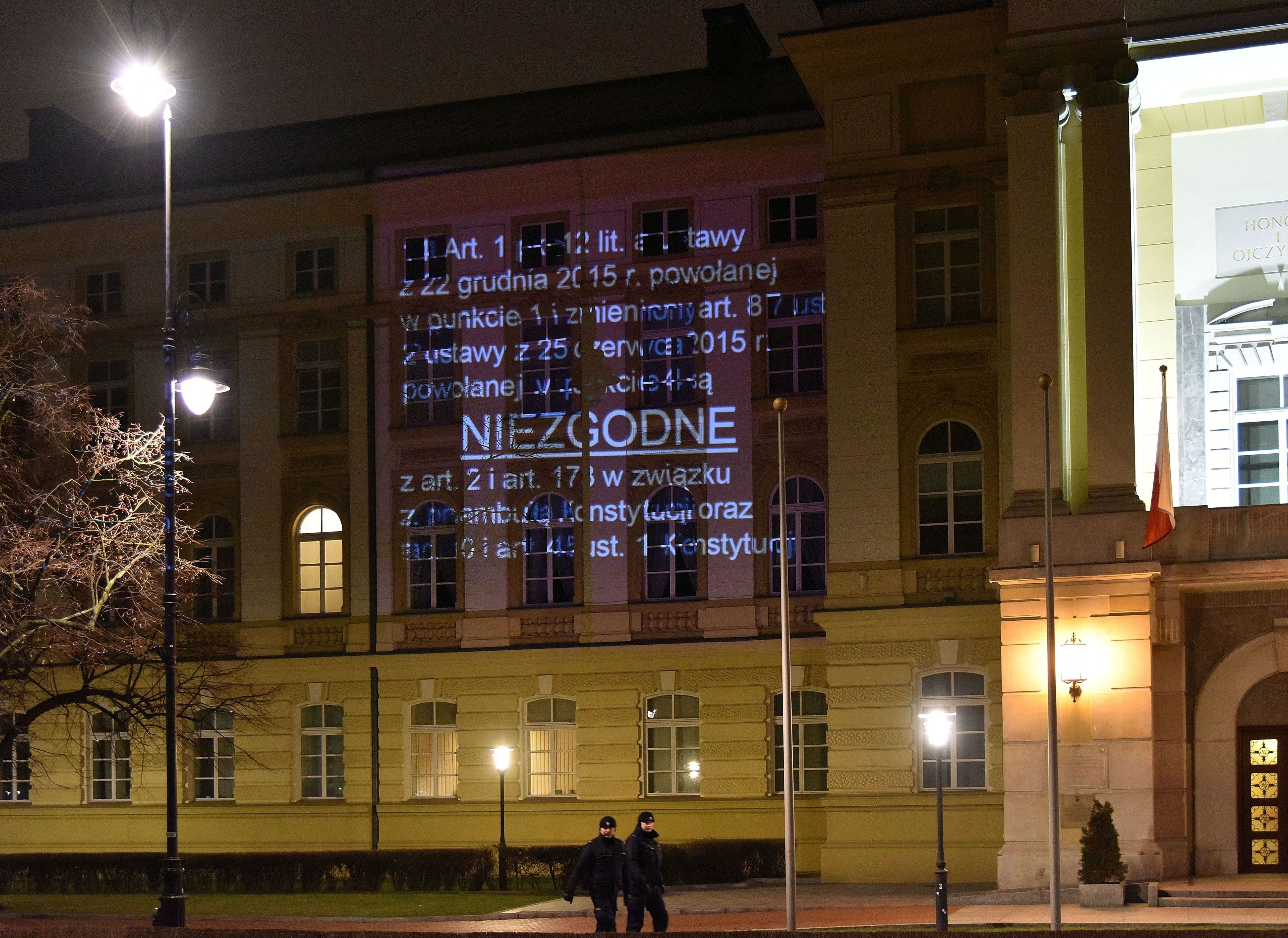 Fragment sentencji wyroku Trybunału Konstytucyjnego w sprawie sygn. K 47/15 z 9 marca 2016 wyświetlany na elewacji gmachu Kancelarii Prezesa Rady Ministrów w Alejach Ujazdowskich 1/3 przez uczestników pikiety partii Razem i Komitetu Obrony Demokracji